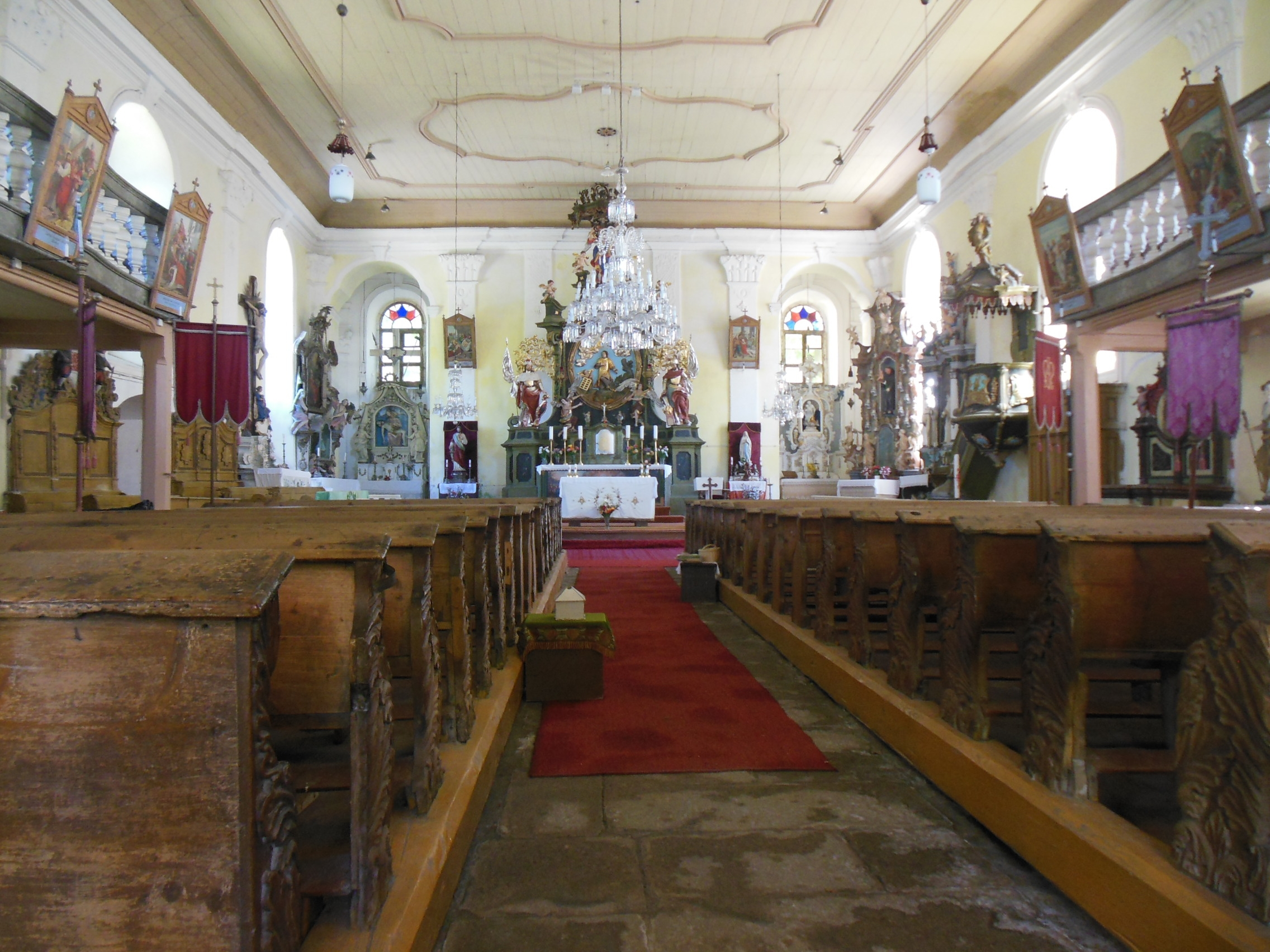 Interiér kostela svatého Vavřince na náměstí Sv. Vavřince v Horní Blatné (okres Karlovy Vary).